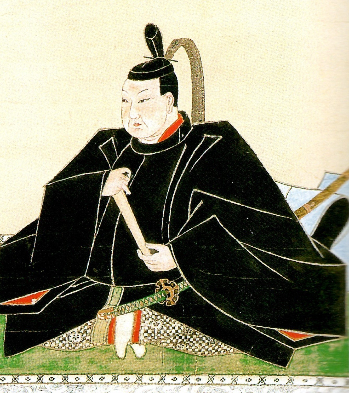 立花鑑任の肖像。